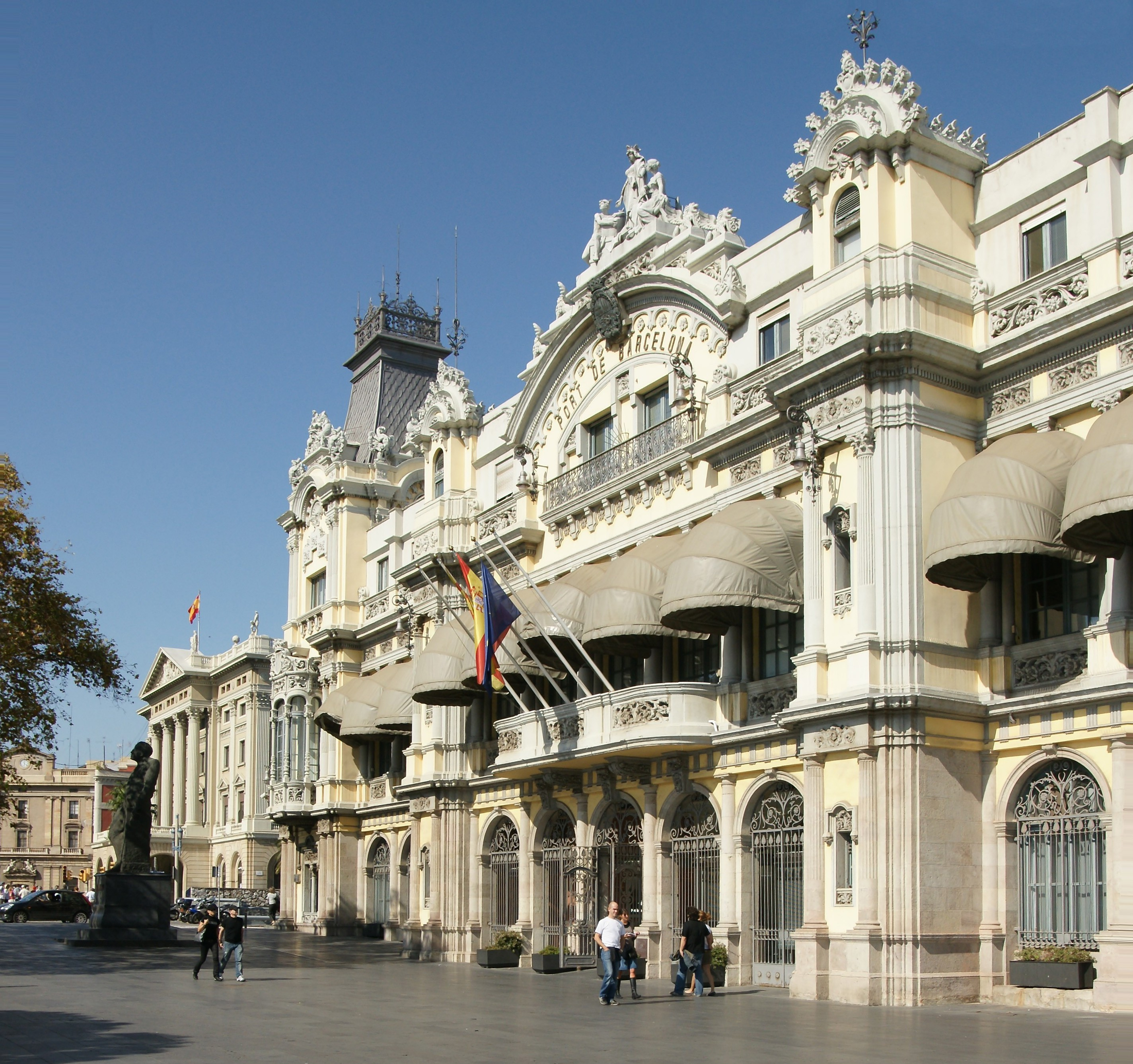 Das Hafengelände "Port Vell" im 1. Bezirk (Ciutat Vella) von Barcelona. Hier das Hafengebäude "Port de Barcelona".